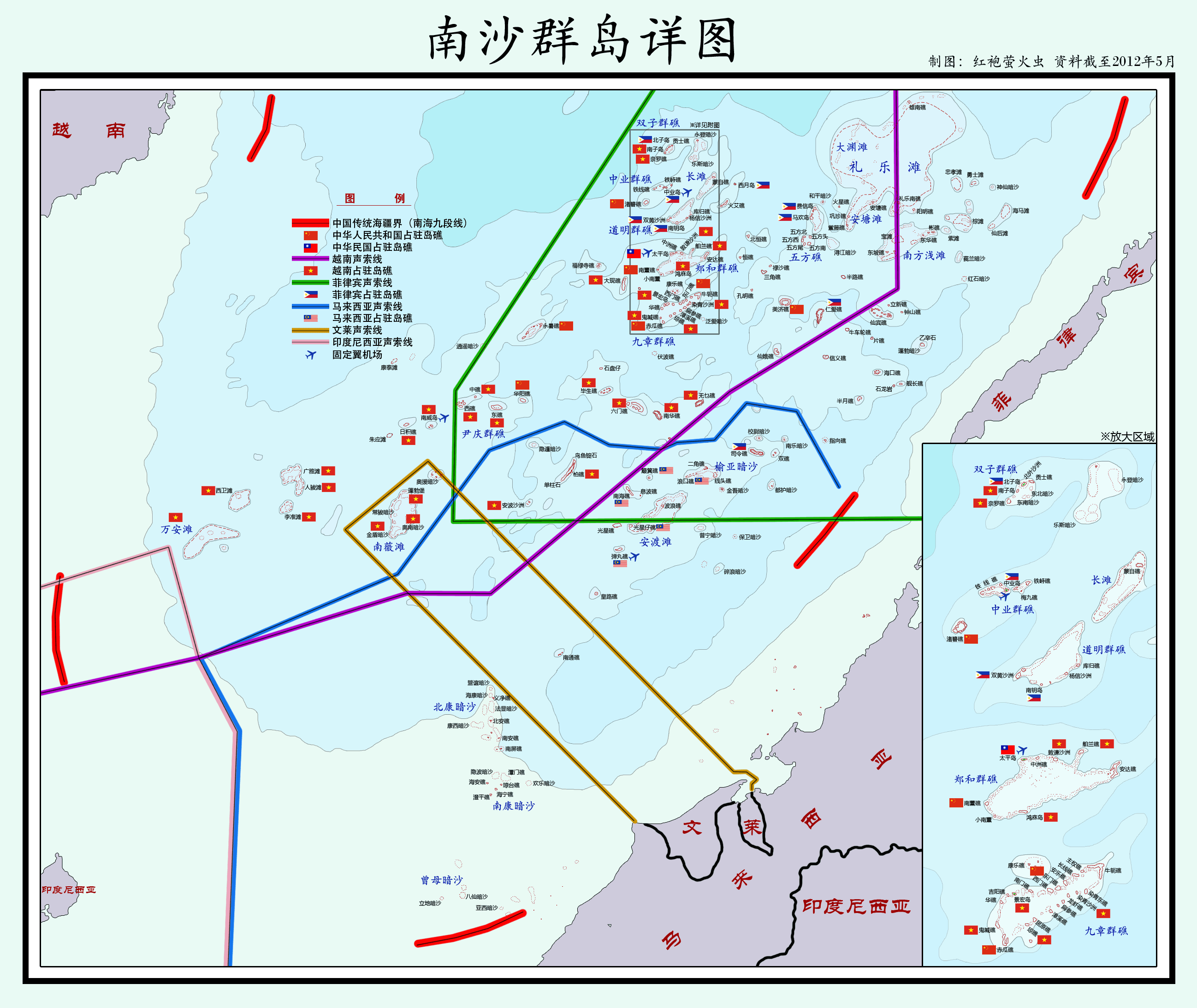 标示出各国在南沙群岛及其周边海域的声索区，以及各国驻军现状。